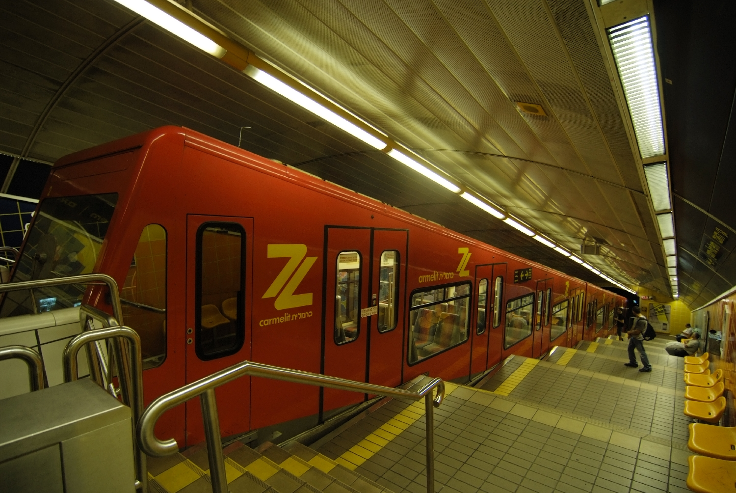 Wikimania 2011 in Haifa, Israel Carmelit